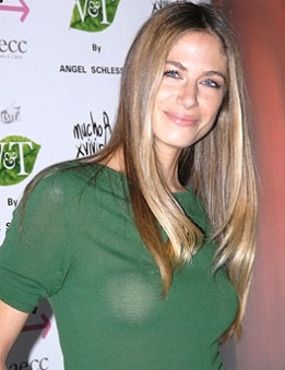 Modelo argentina radicada en España desde los 12 años.